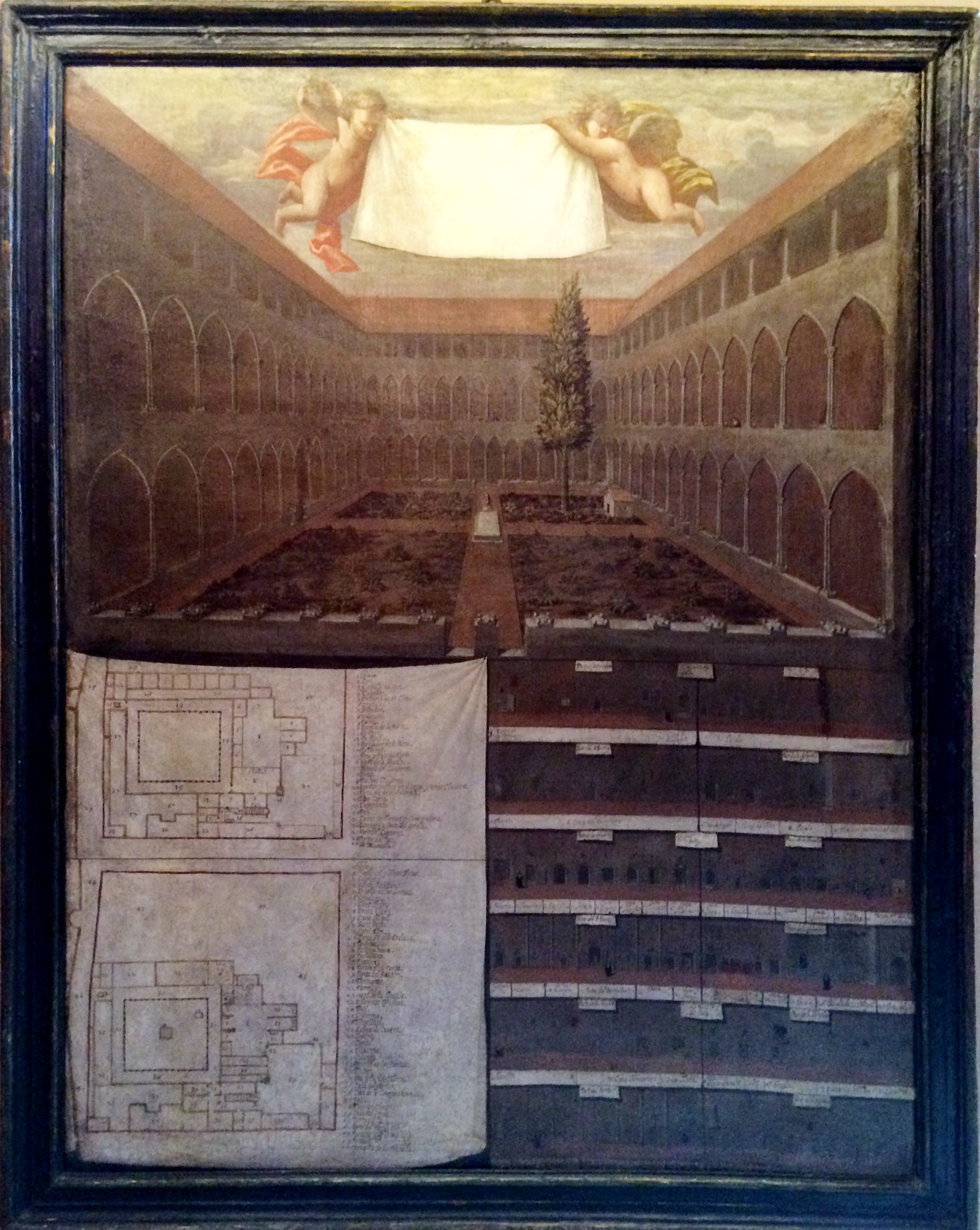 Convent de Santa Clara de Barcelona, destruït després del setge de Barcelona de 1714. El quadre va ser realitzat per Joan Sentís a començaments del s. XVIII i es conserva al Monestir de Sant Benet de Montserrat.